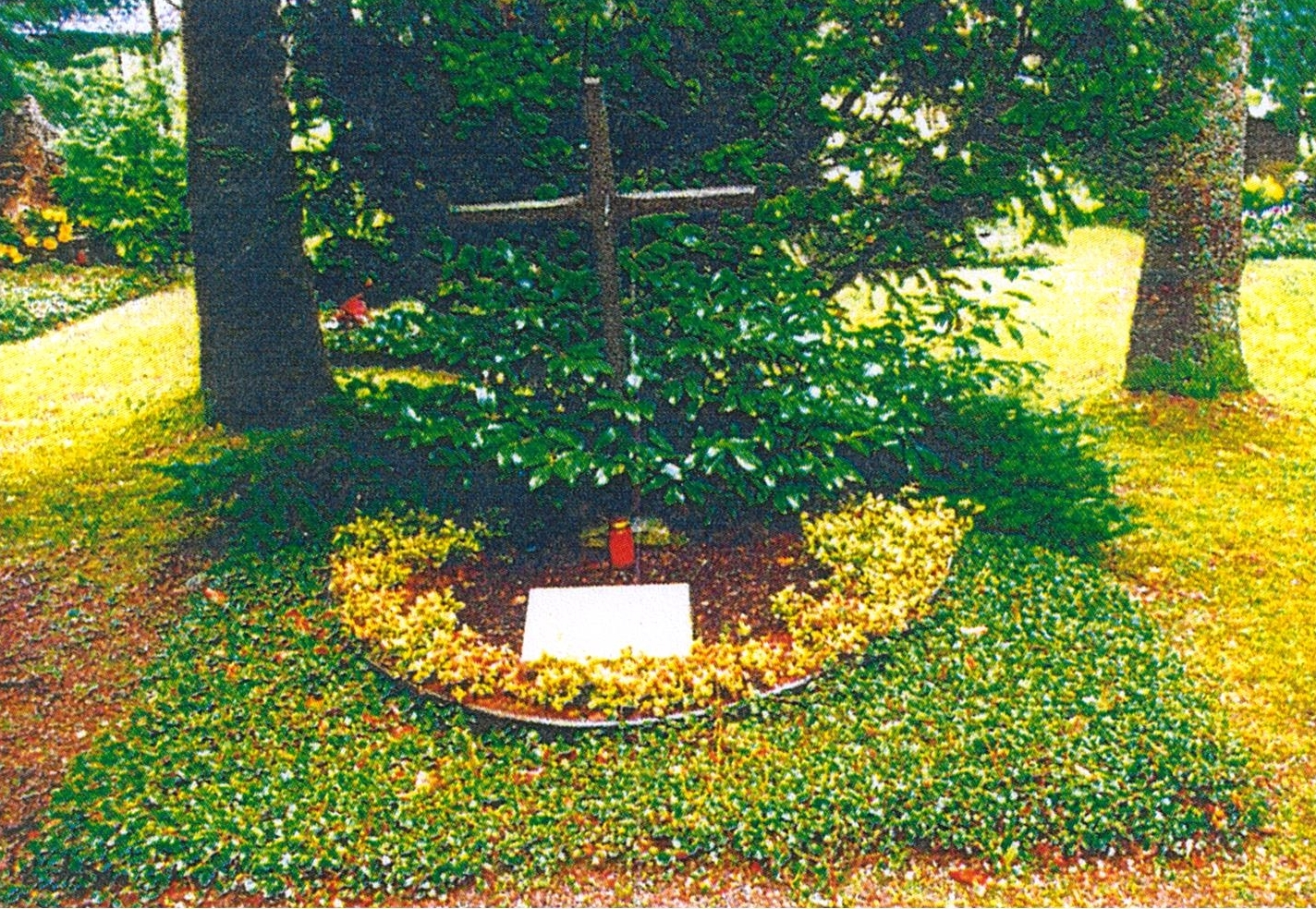 Waldfriedhof Grünwald-Hertha Feiler